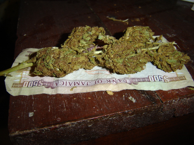 Jamaican Ganja